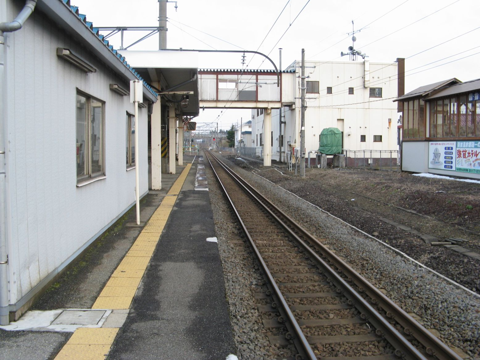 Kariwano Station, on Ou Main Line, Daisen, Akita, Japan